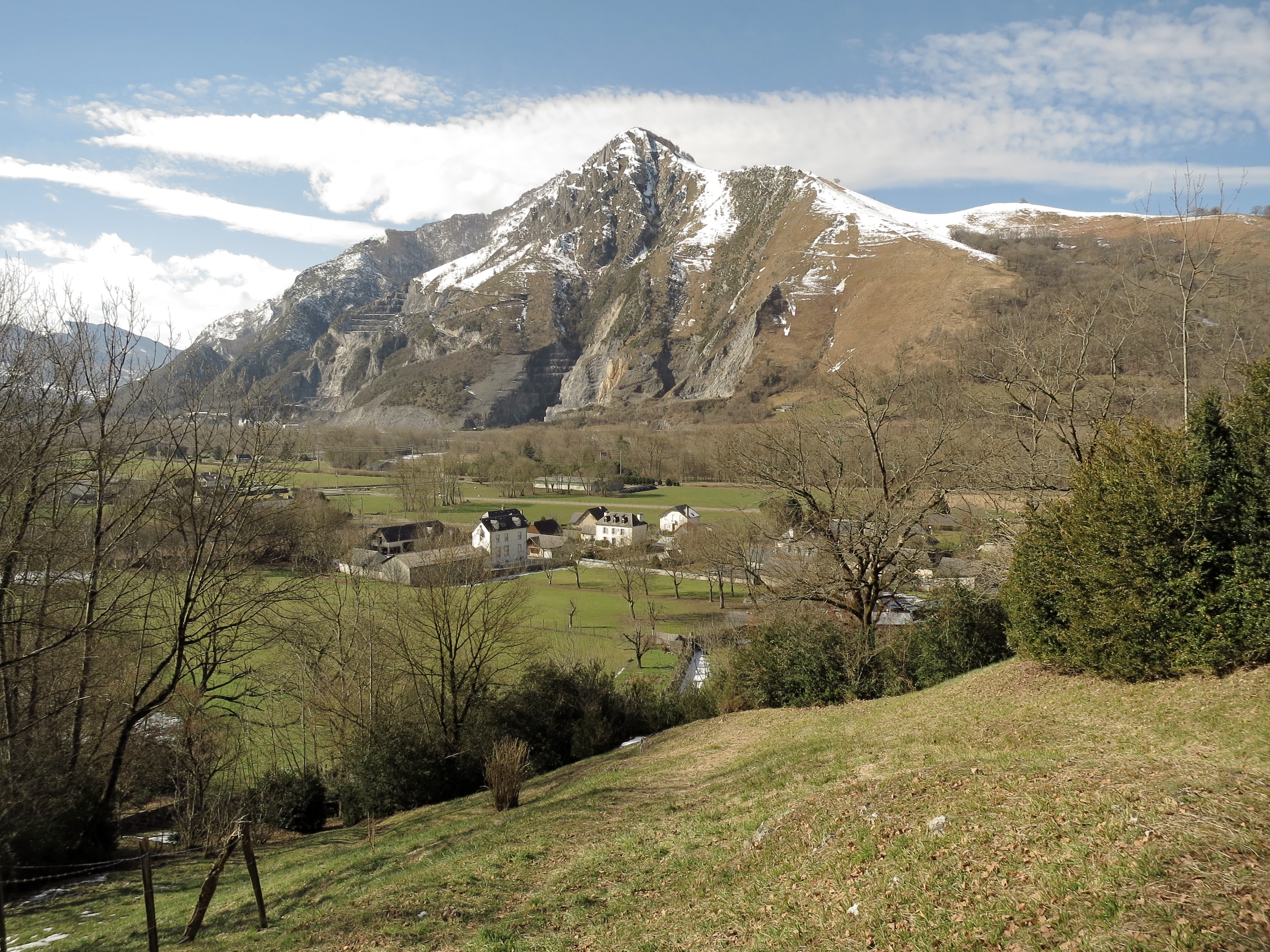 Geu (Hautes-Pyrénées, France) - Vue du village et du pic du Pibeste.